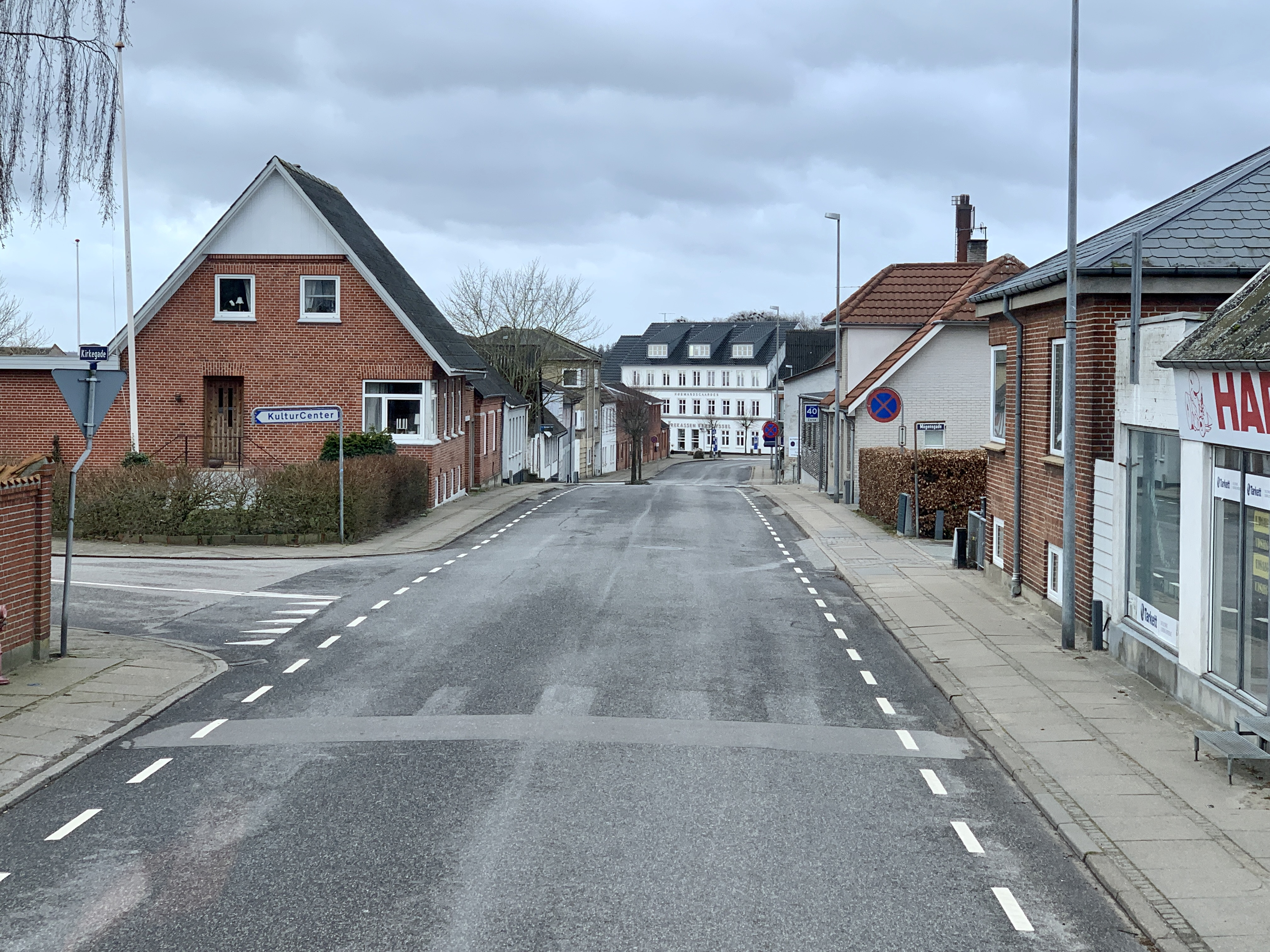 Østergade, Hadsund. Den hvide bygning længere fremme er Købmandsgaarden fra 1855